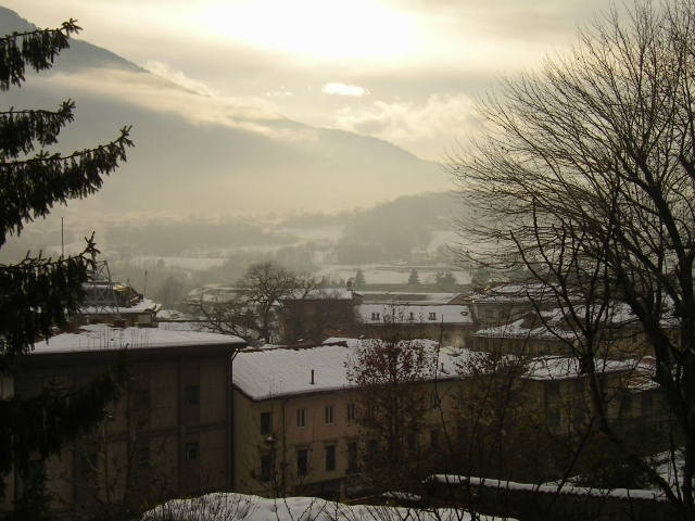 Foto scattata da me medesimo il 4.12.2005 a Feltre (BL). Panorama verso S - Monte Tomatico